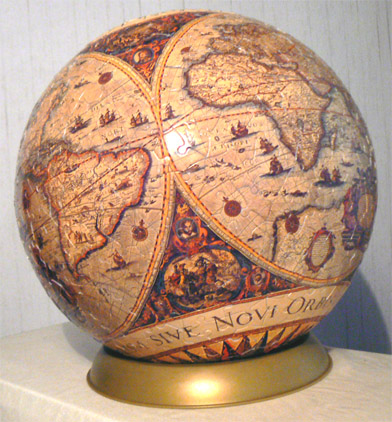 3d jigsaw puzzle (puzzleball)